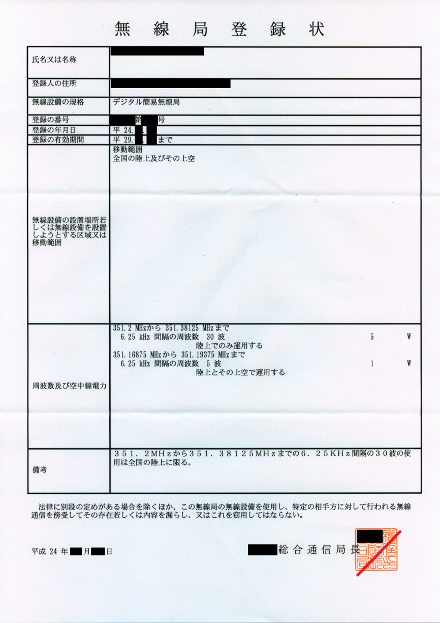 無線局登録状（デジタル簡易無線局、平成24年交付）